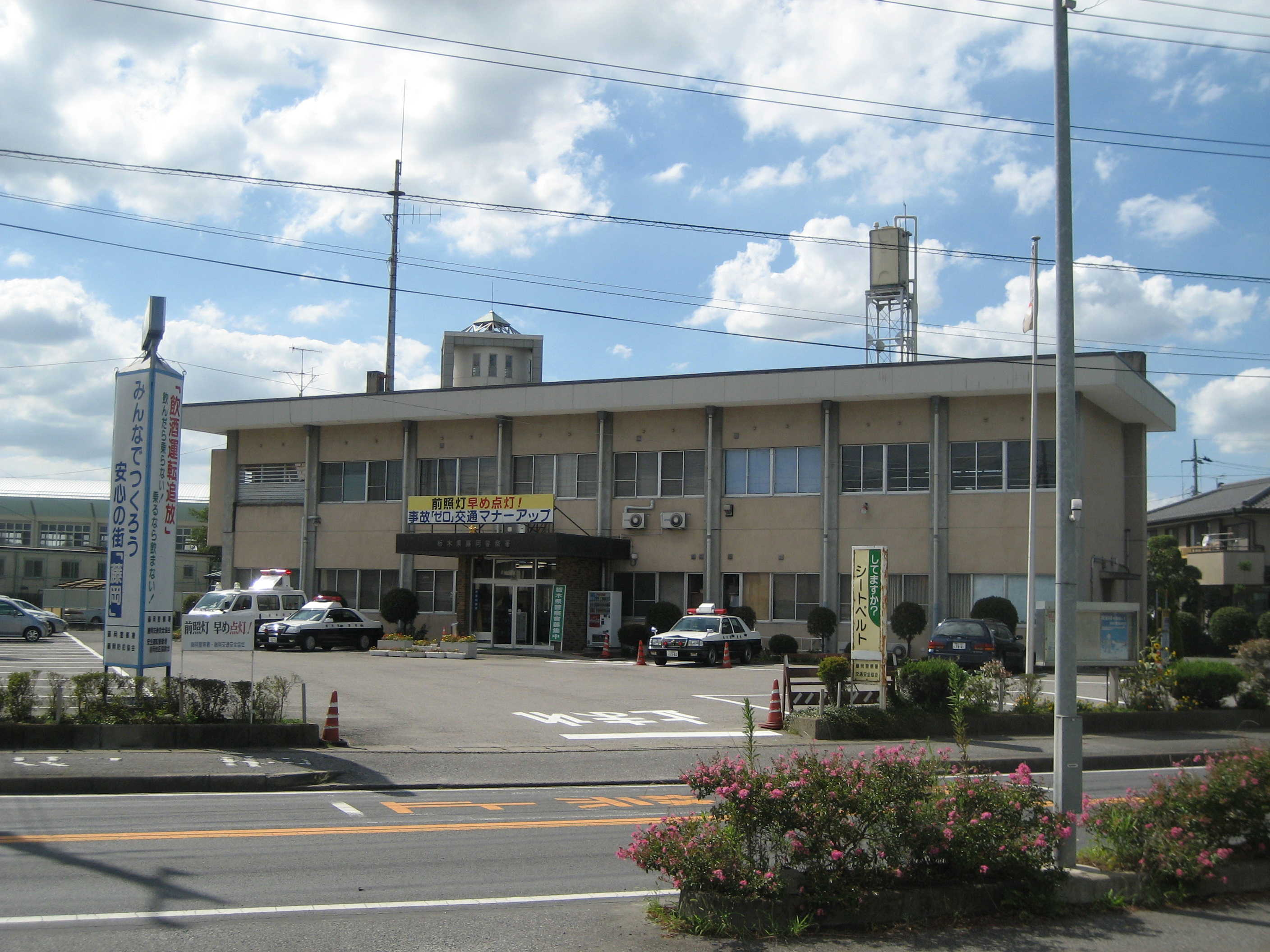 栃木県警察藤岡警察署庁舎